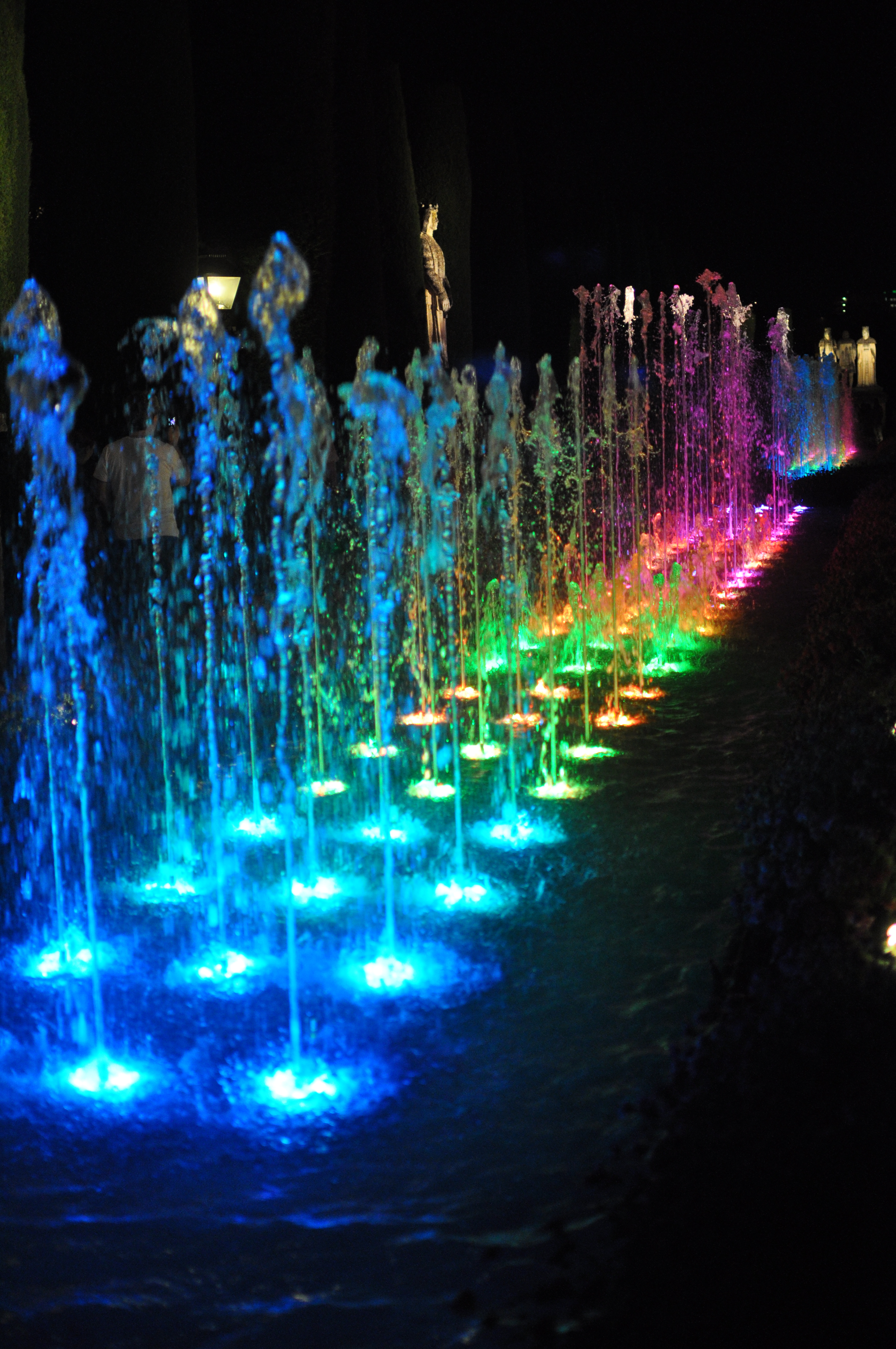 Espectáculo de agua, luz y sonido en el Alcázar de los Reyes Cristianos de Córdoba (España).